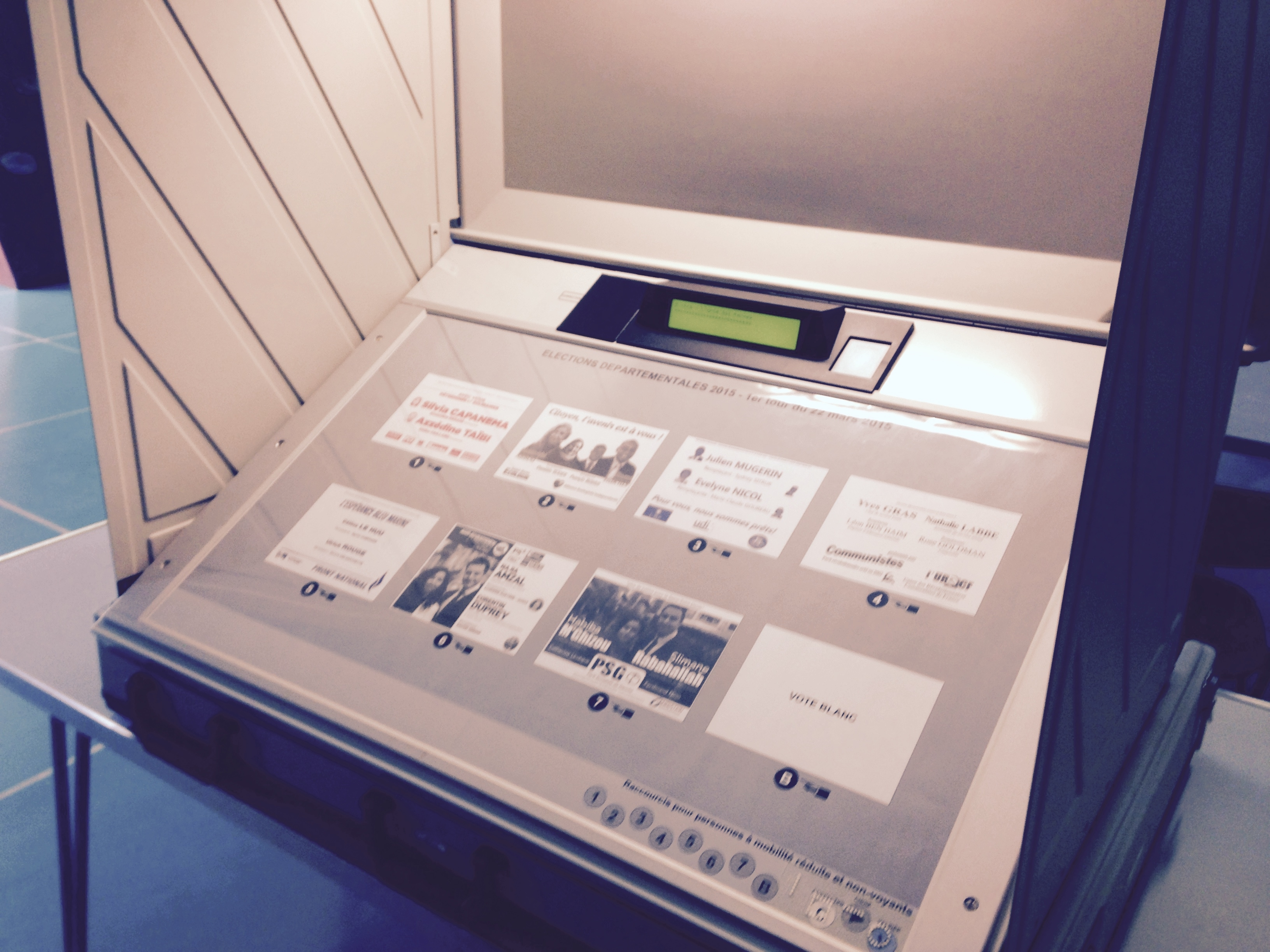 Nedap Machine à voter utilisée à Stains (Seine-Saint-Denis, France) pour le 1er tour des élections départementales le 22 mars 2015. Le votant appuie sur la pastille numérotée sous le bulletin de vote choisi puis valide son choix sur le bouton en haut à droite. Les touches du bas sont pour les personnes malvoyantes.